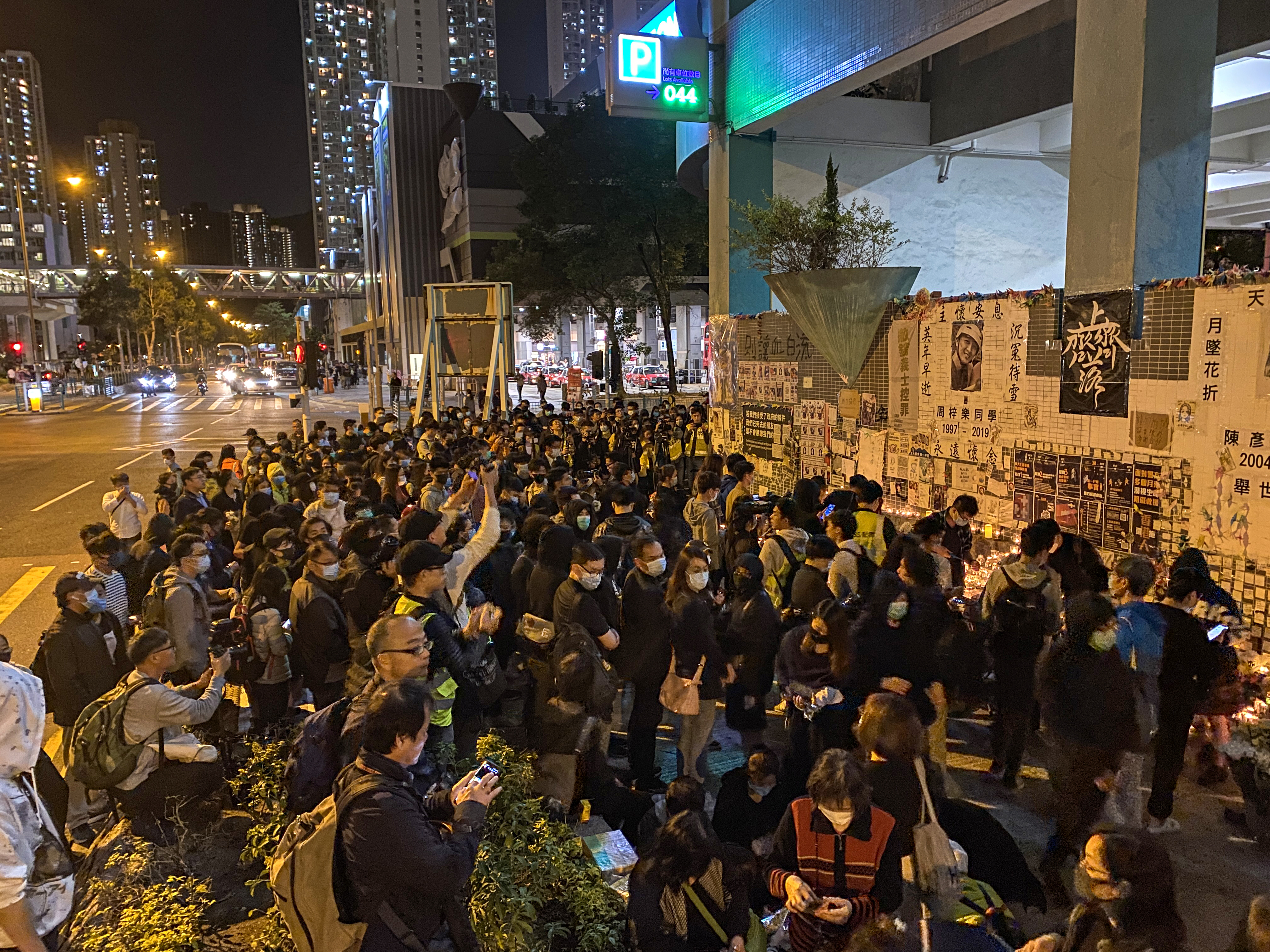 周梓樂逝世兩個月悼念會 20200108